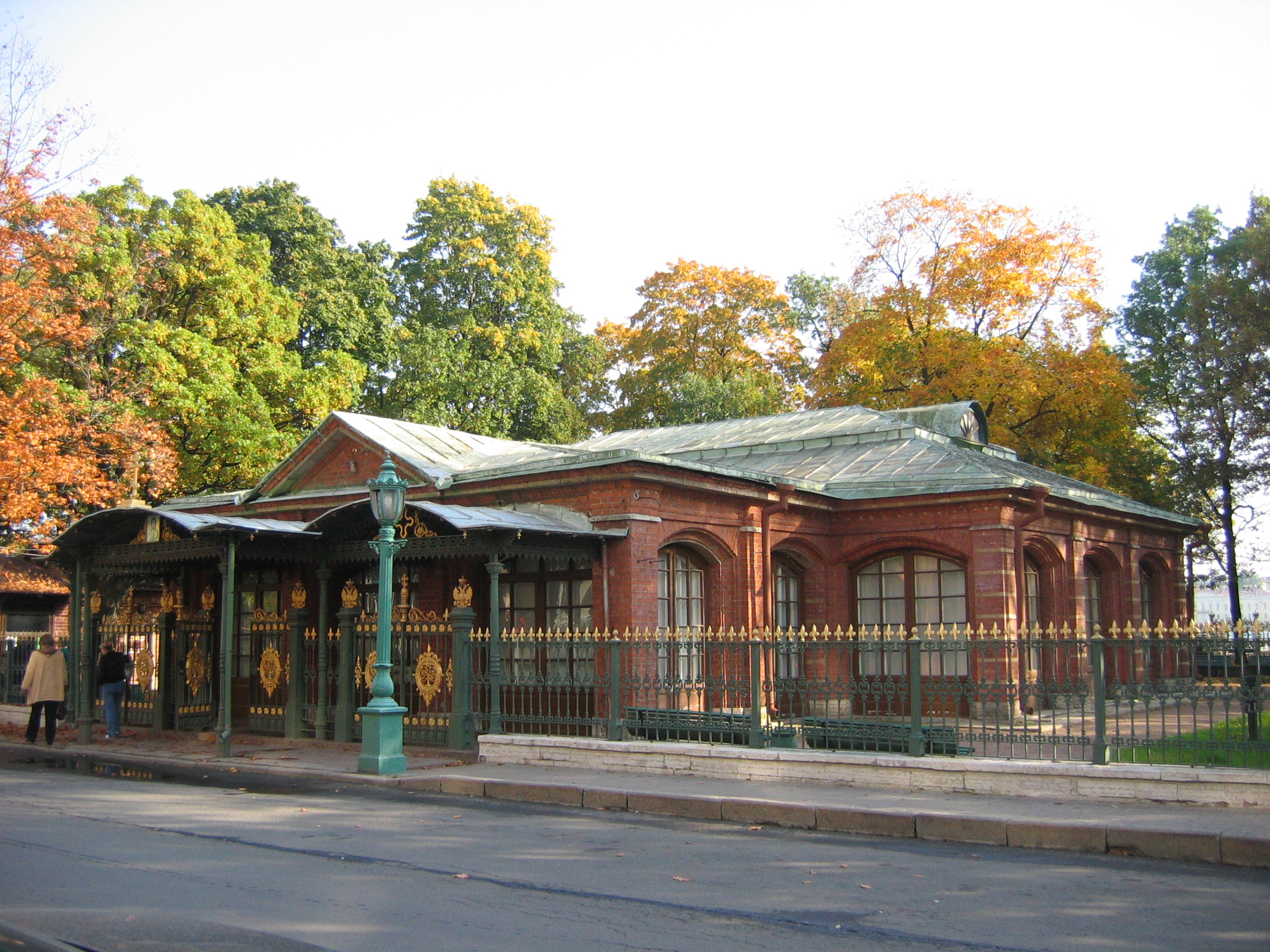 Домик Петра I